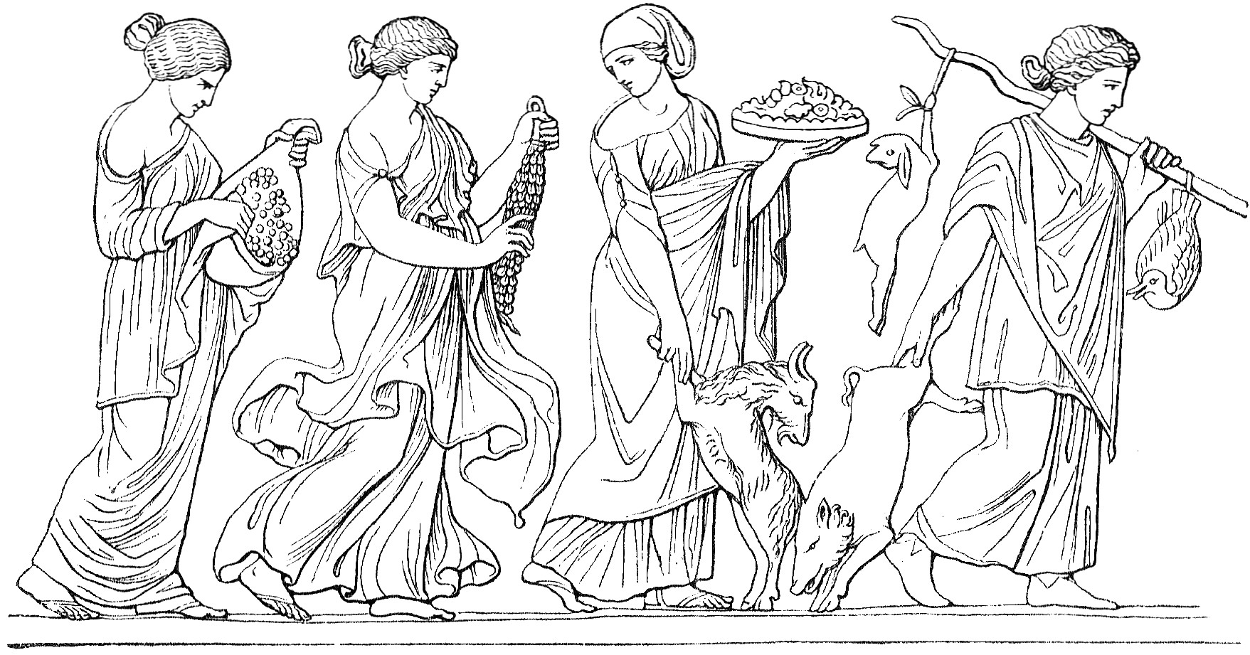 Die Horen, dem Peleus Hochzeitsgeschenke bringend (Paris, Louvre)